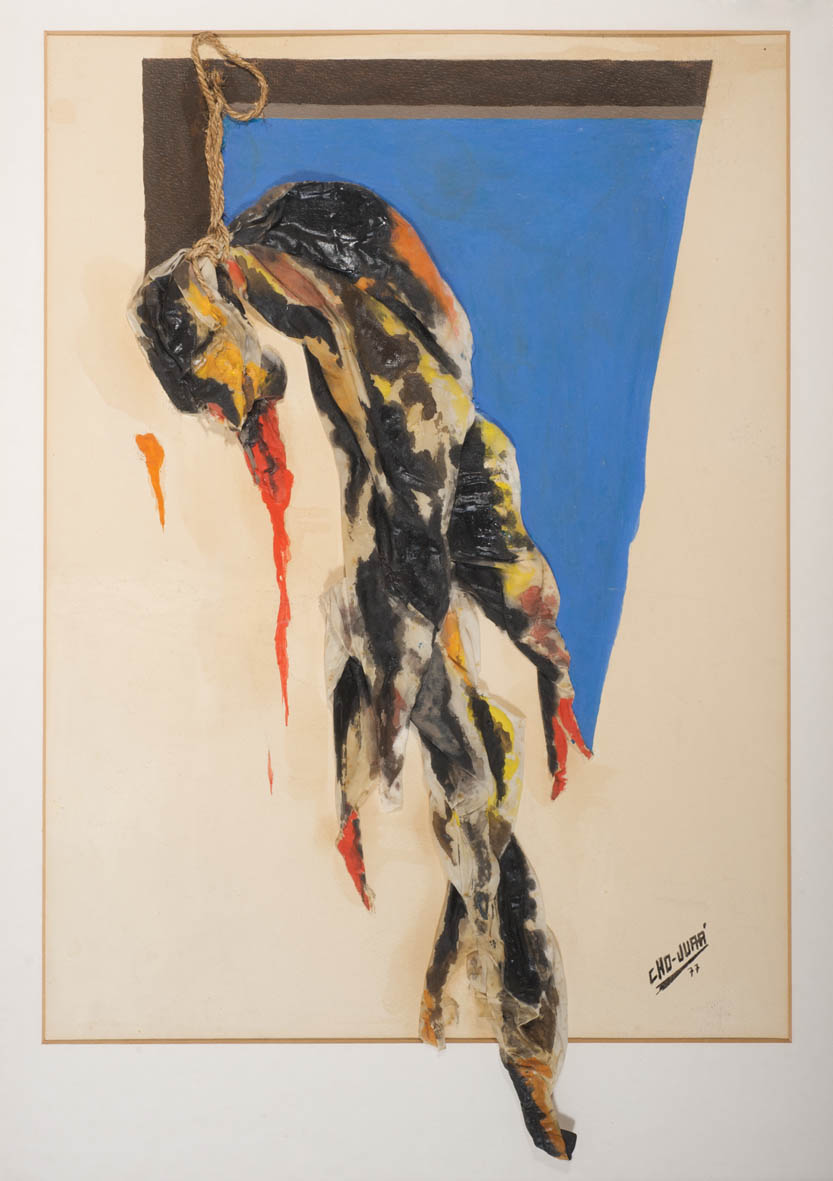 Arpillera